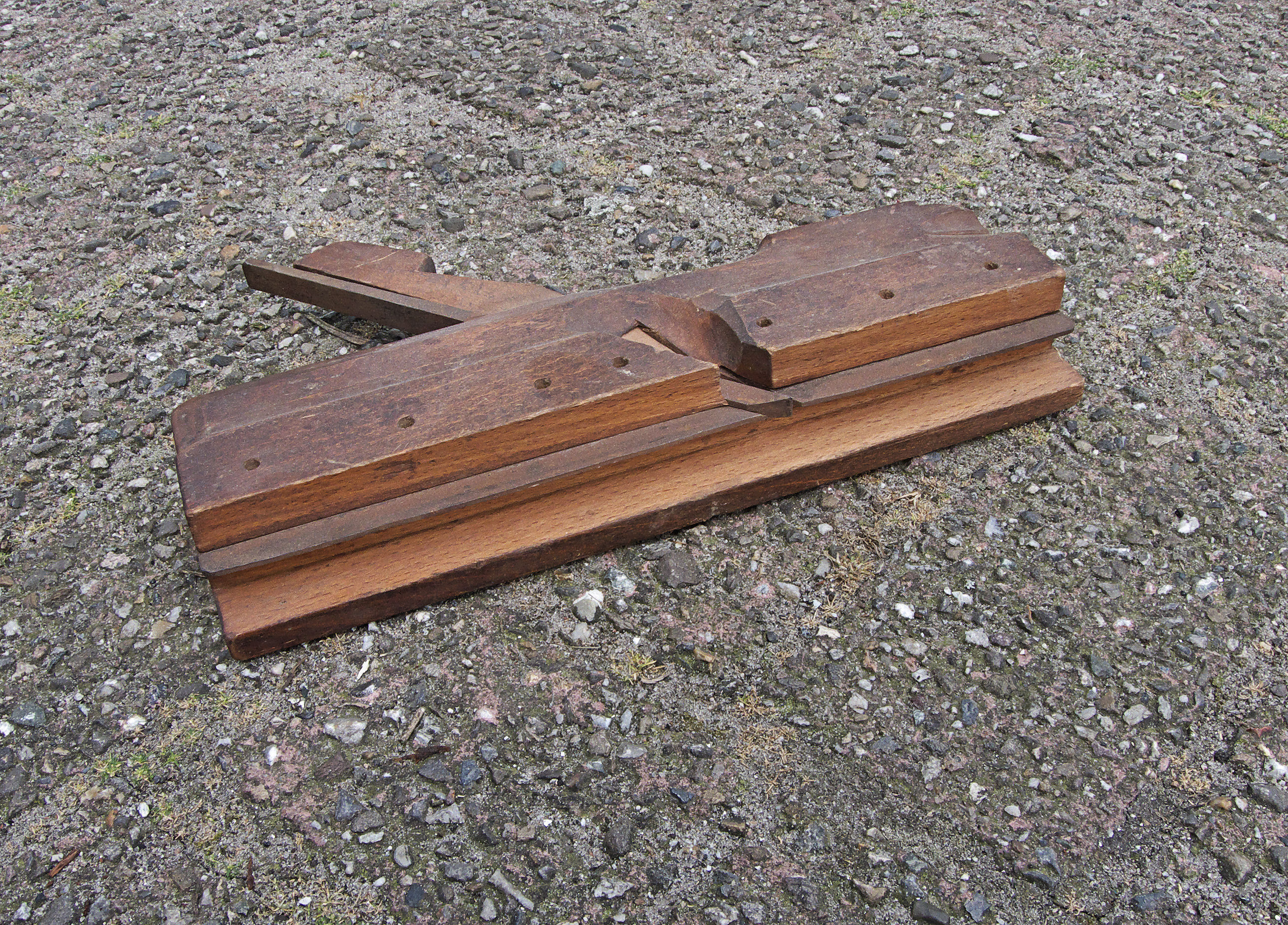 Groevenschaaf